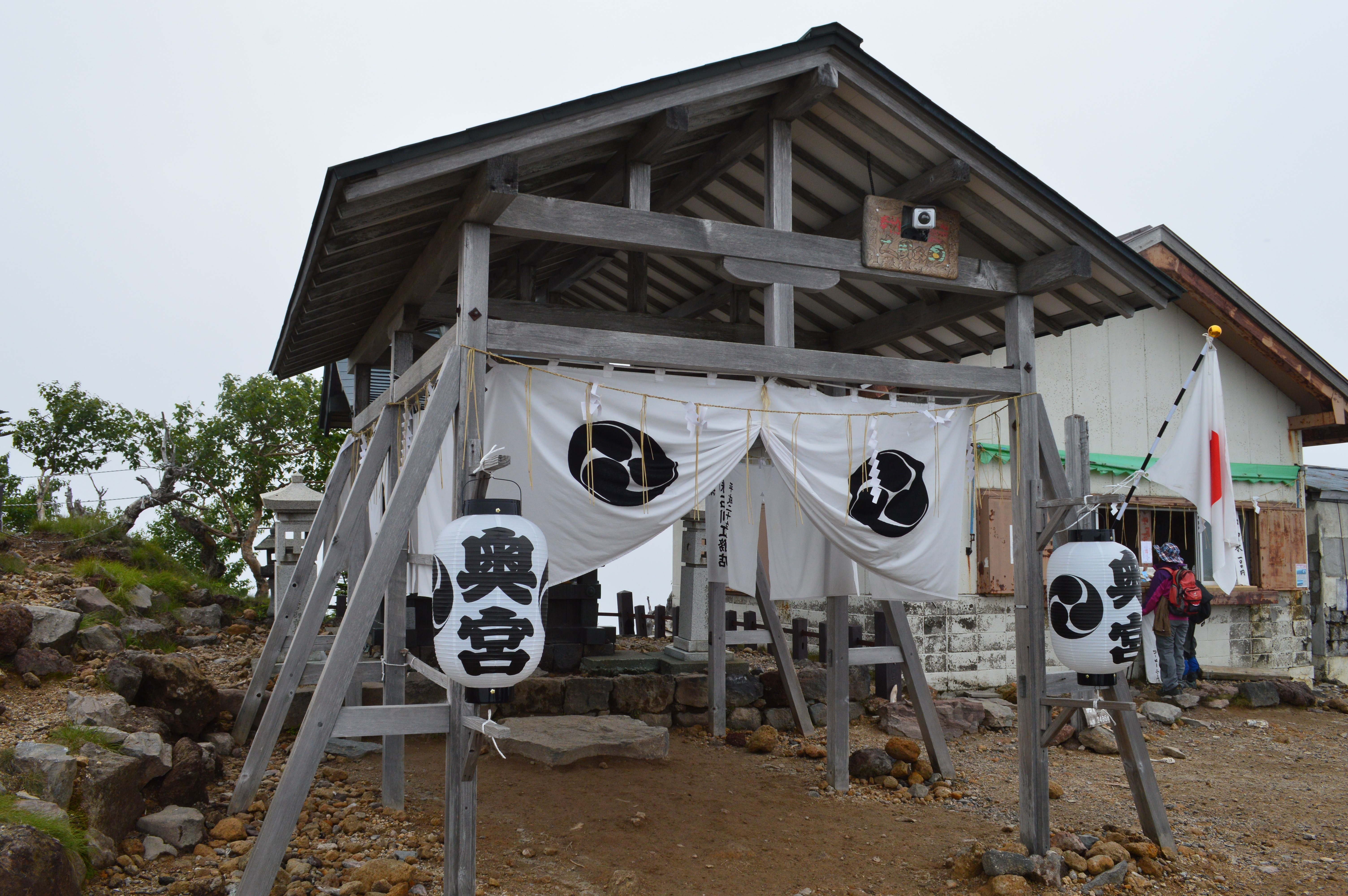 日光二荒山神社 奥宮-2